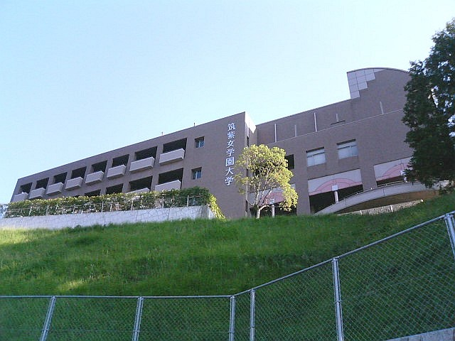 筑紫女学園大学3号館